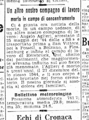 necrologio